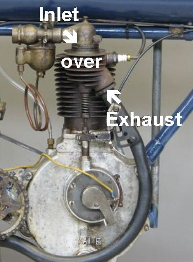 Yale IOE engine from 1911